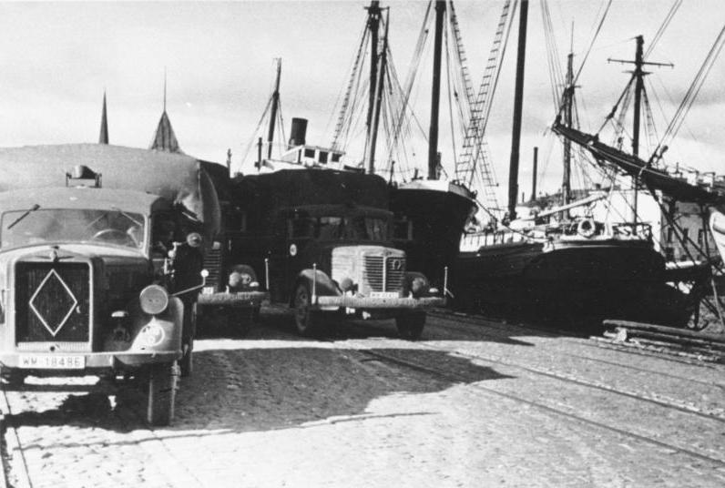 S.S.R.Estland, Reval [Tallin], 18.9.1941 Die Lkw. der Nachschubkolonne übernehmen im Hafen von Reval auf Schiffen angekommene Nachschubgüter. Neg.Nr.: M.246/10 von H.F. [Heeresfilmstelle]